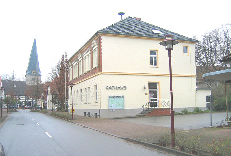 Rathaus der Stadt Rahden, im Hintergrund St. Johannis Kirche